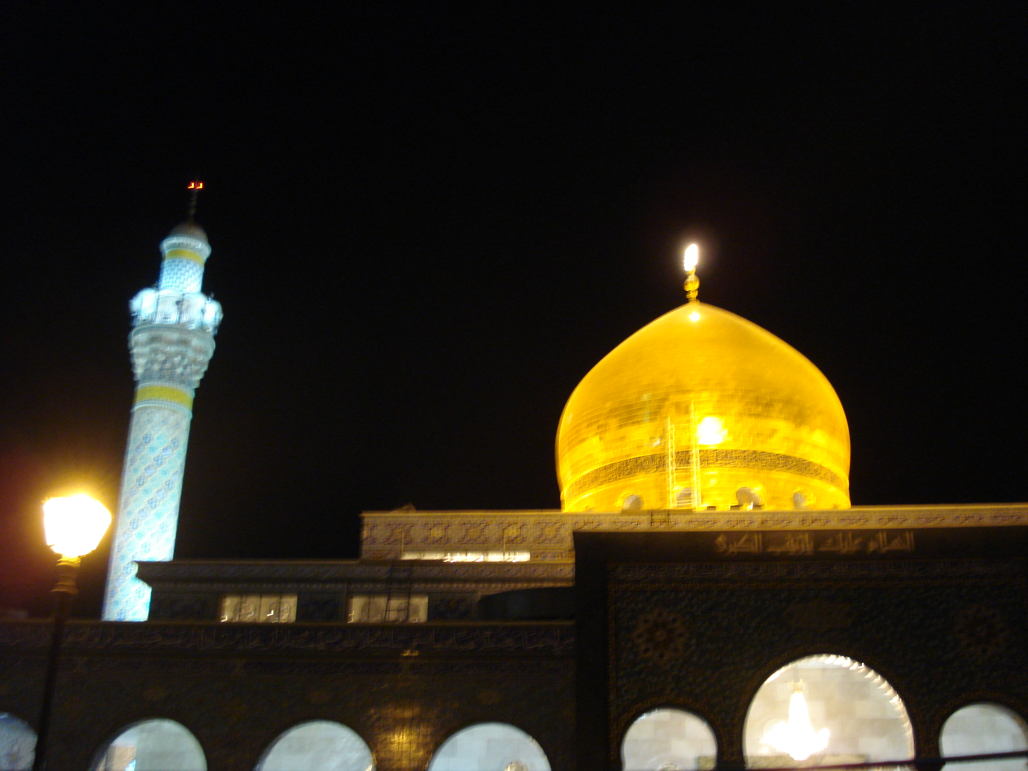 ضريح السيدة زينب جنوب دمشق